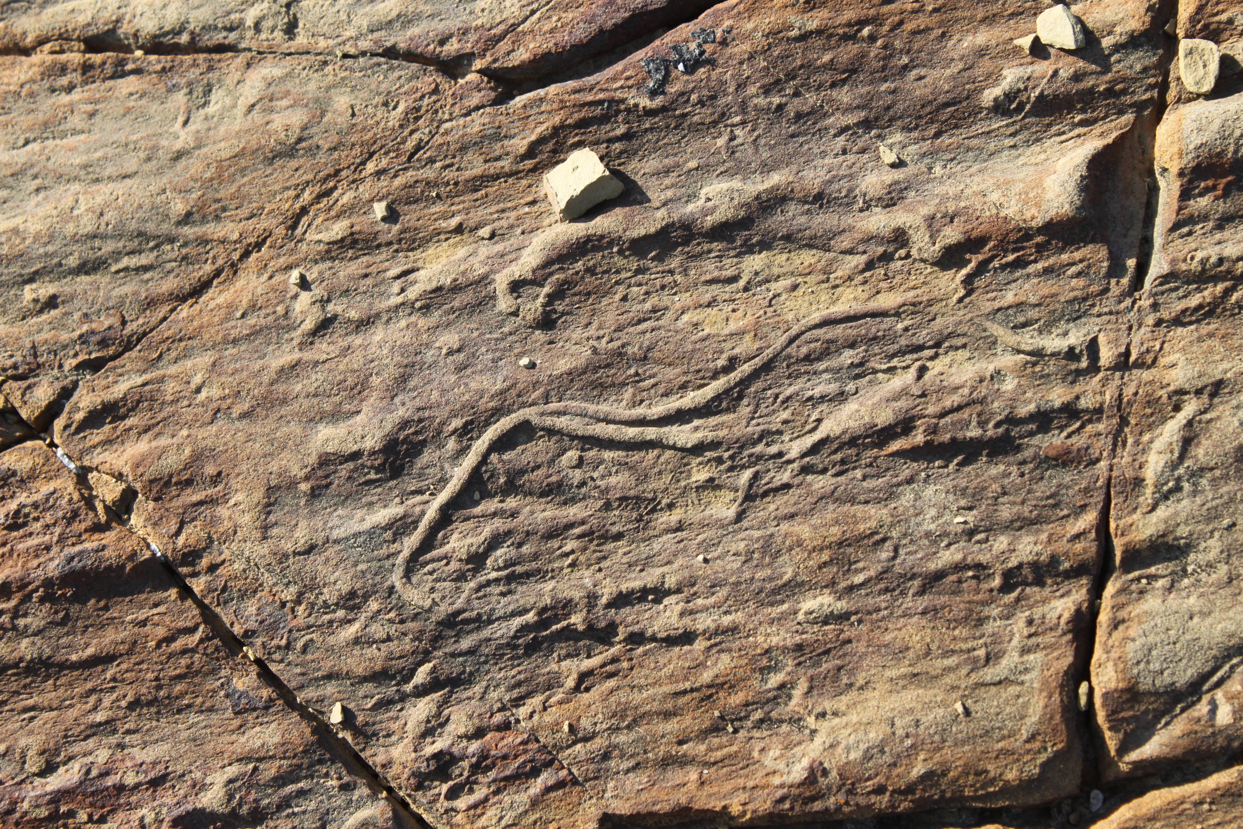 Icnofósil Helminthopsis (Heer 1877) en arenisca de los flyschs de punta San García. Complejos del Campo de Gibraltar, Unidad de Algeciras (Oligoceno-Mioceno). Algeciras, Andalucía, España.